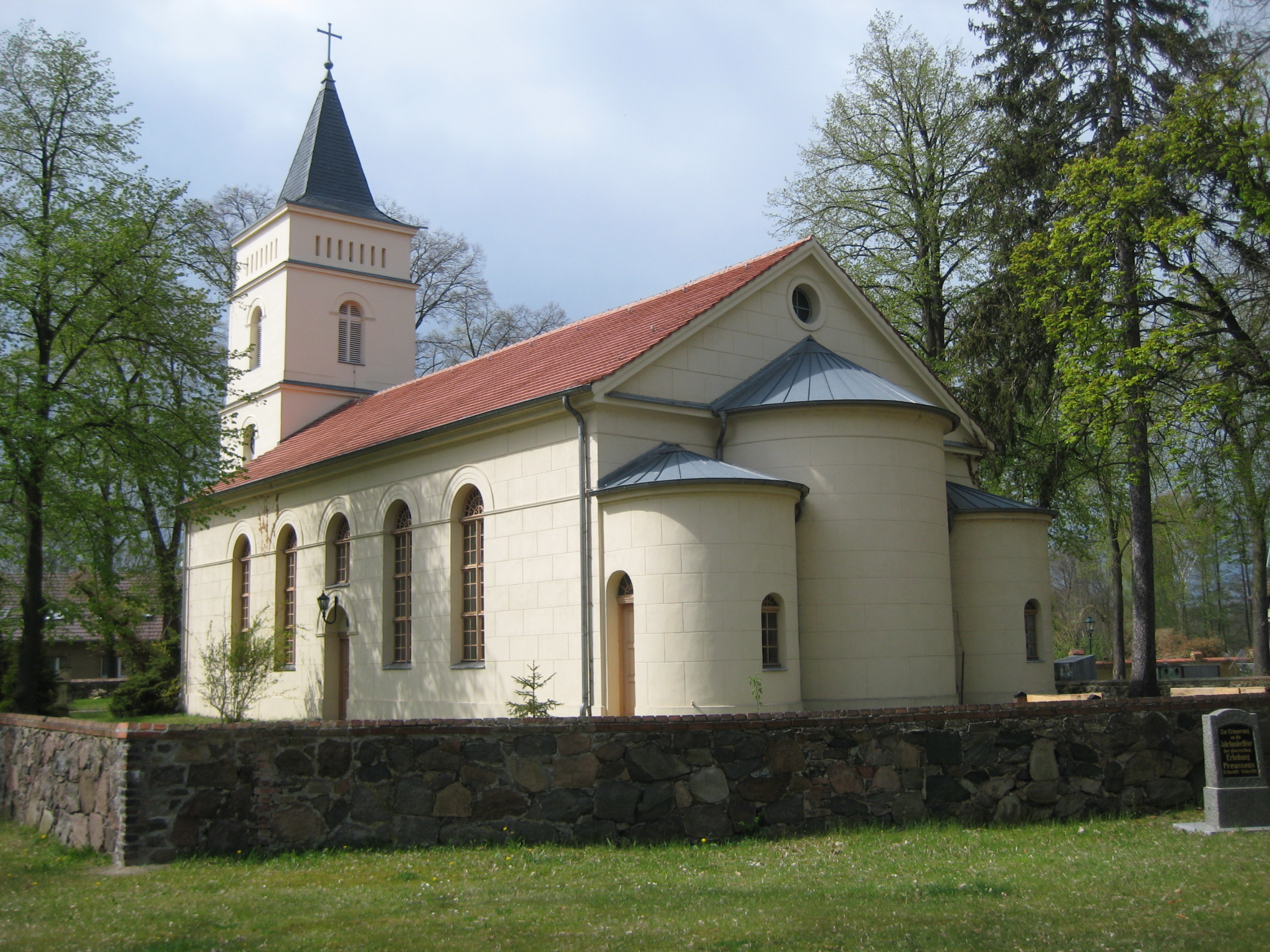 Kirche in Wünsdorf - Deutschland